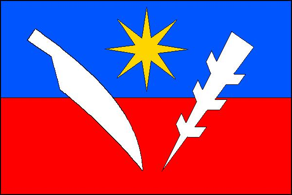 Česky: vlajka obce Lužice